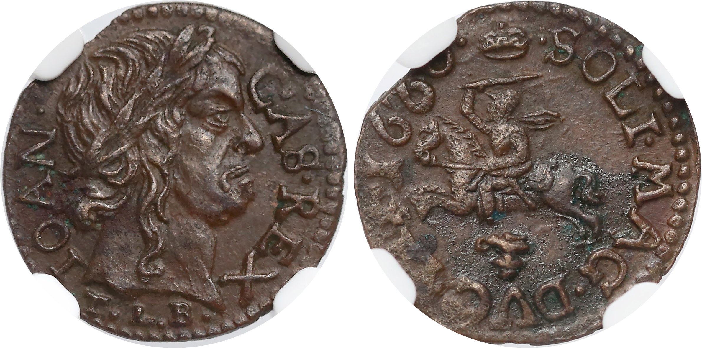 Boratynka litewska 1660 Ujazdow